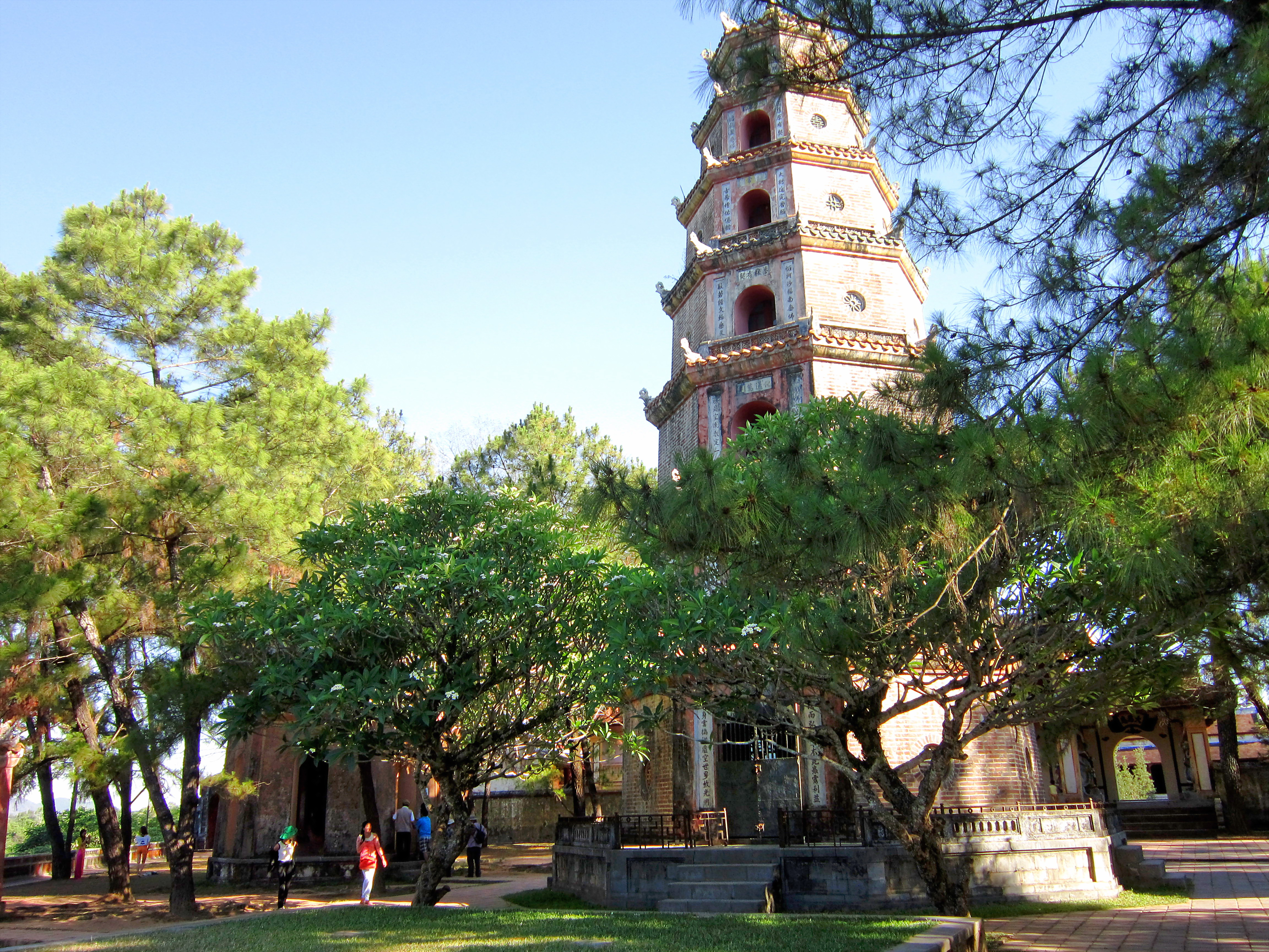 Tháp Phước Duyên ở trước Tam quan chùa Thiên Mụ (Huế, Việt Nam).